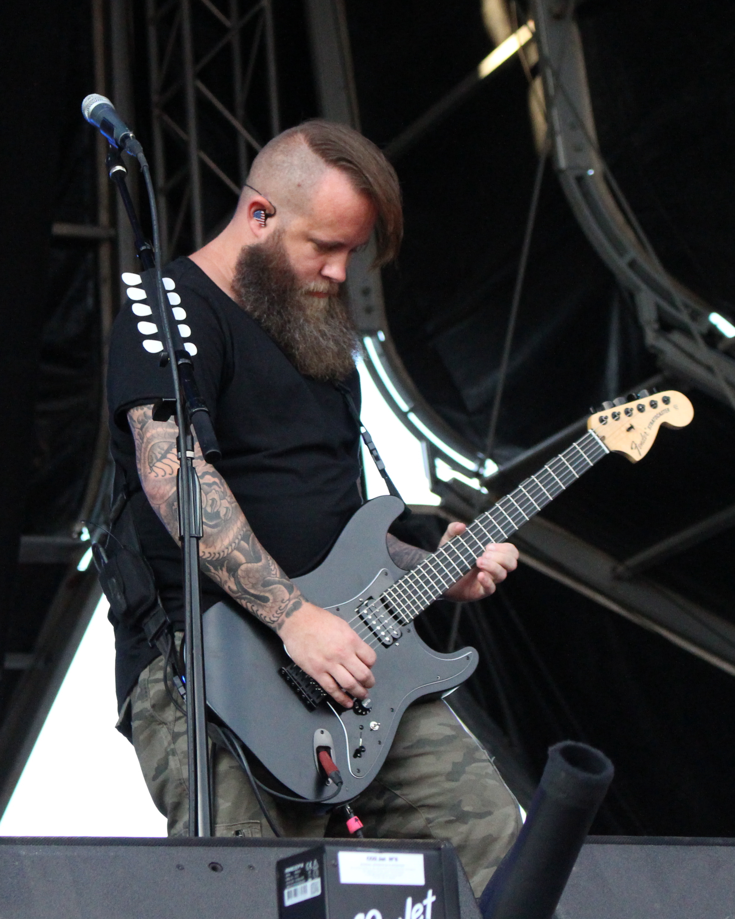 Festivalsommer This photo was created with the support of donations to Wikimedia Deutschland in the context of the CPB project "Festival Summer".